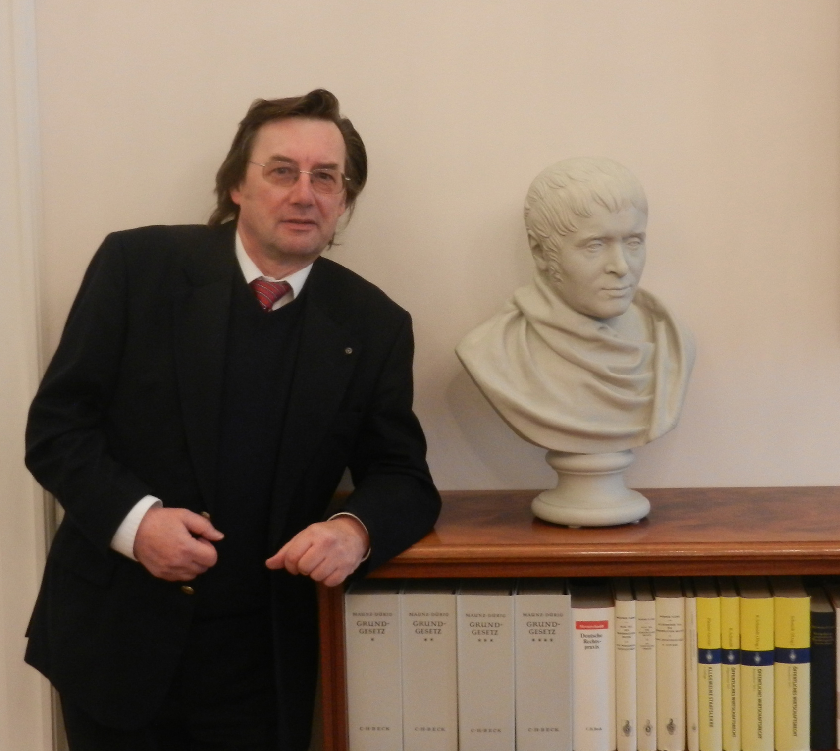 Guenther Emig, Direktor des Kleist-Archivs Sembdner, im Amtszimmer des Bundespräsidenten in Berlin, Schloß Bellevue